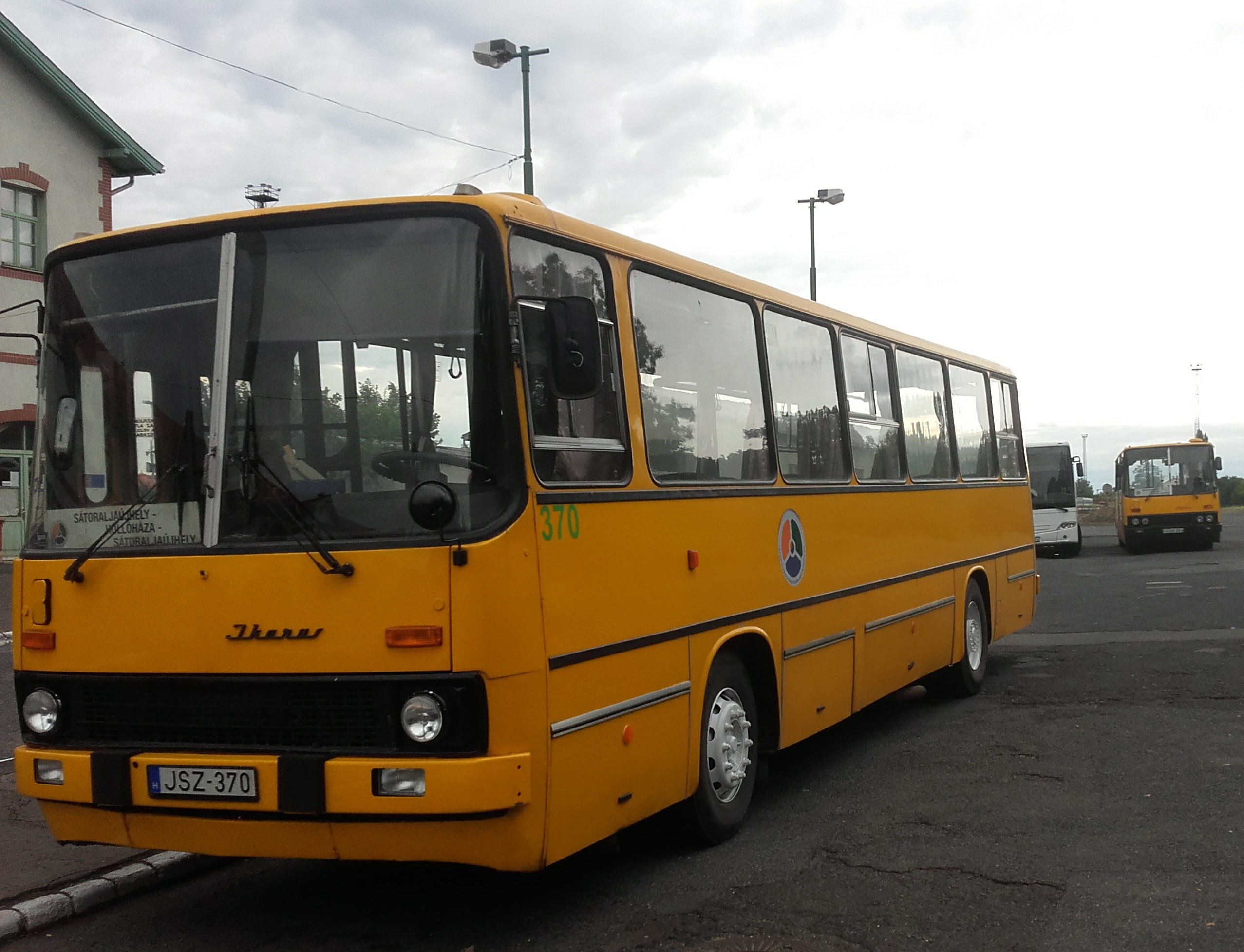 Az ÉMKK JSZ-370 rendszámú Ikarus 260 típusú busza Sátoraljaújhely, a 3901-es helyközi járaton.